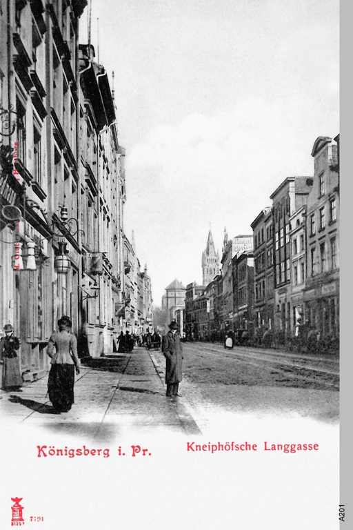 Königsberg, Kneiphöfsche Langgasse, hist. Postkarte